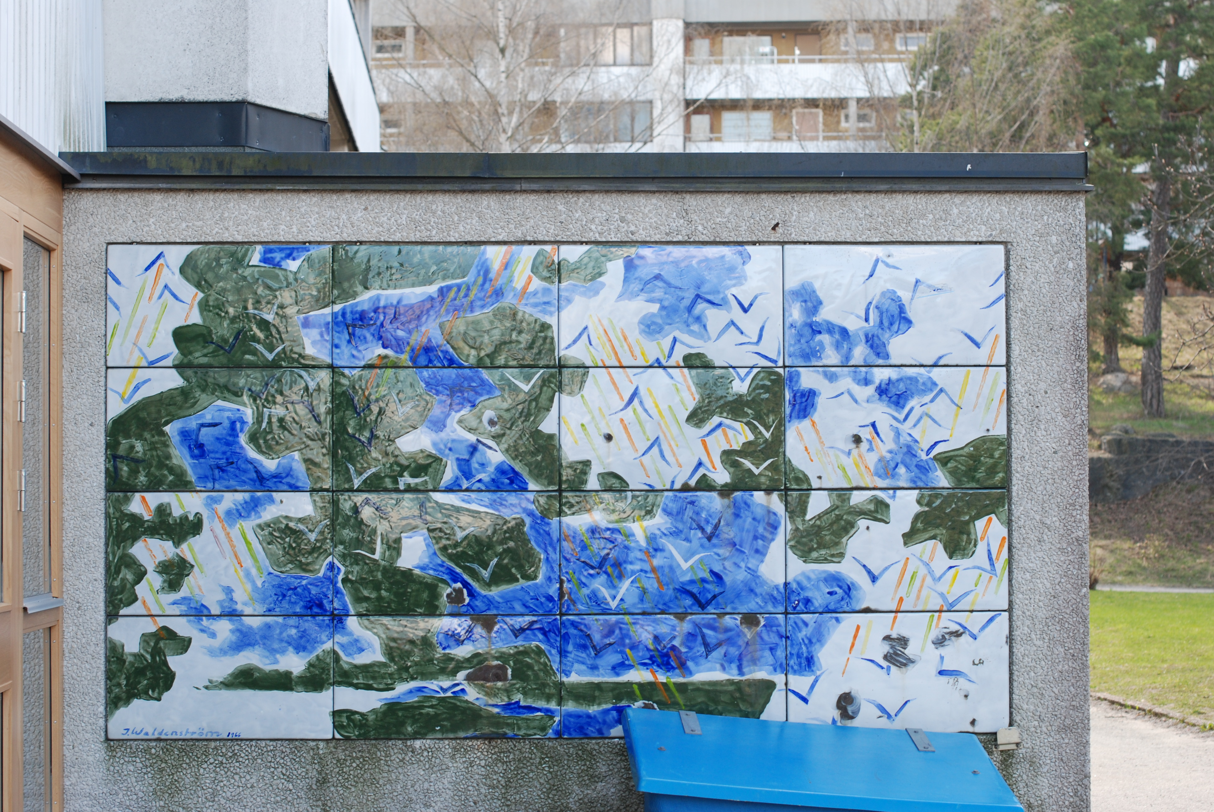 One of Johan Waldenström´s enamel paintings from 1967 at Östbergahöjden in Stockholm